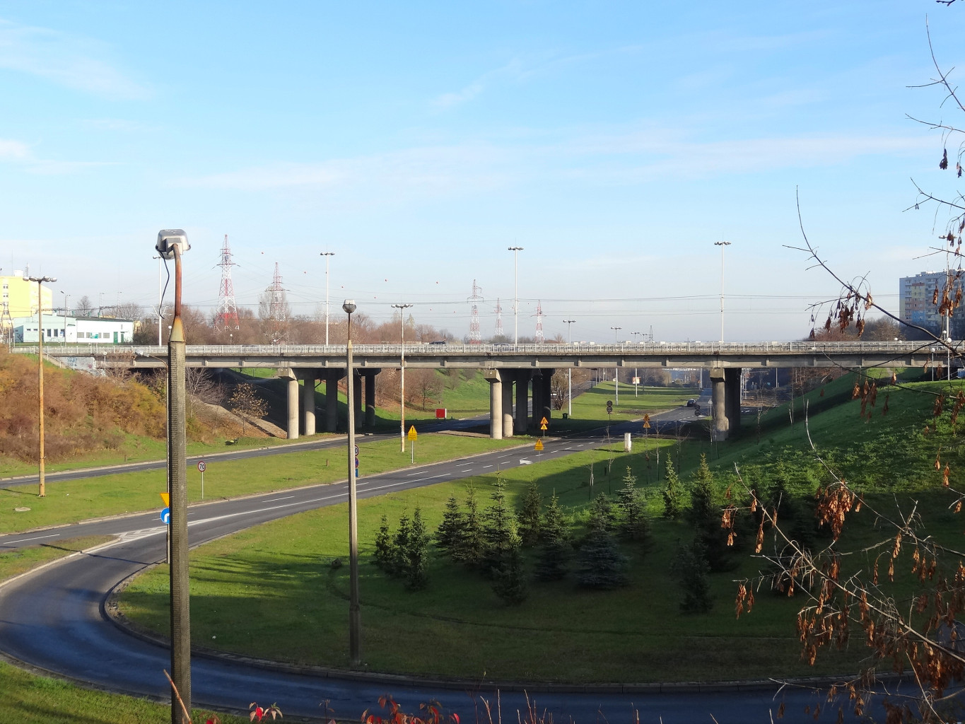 Aleja Jana Pawła II w Bydgoszczy - wiadukt w ciągu al. Wojska Polskiego